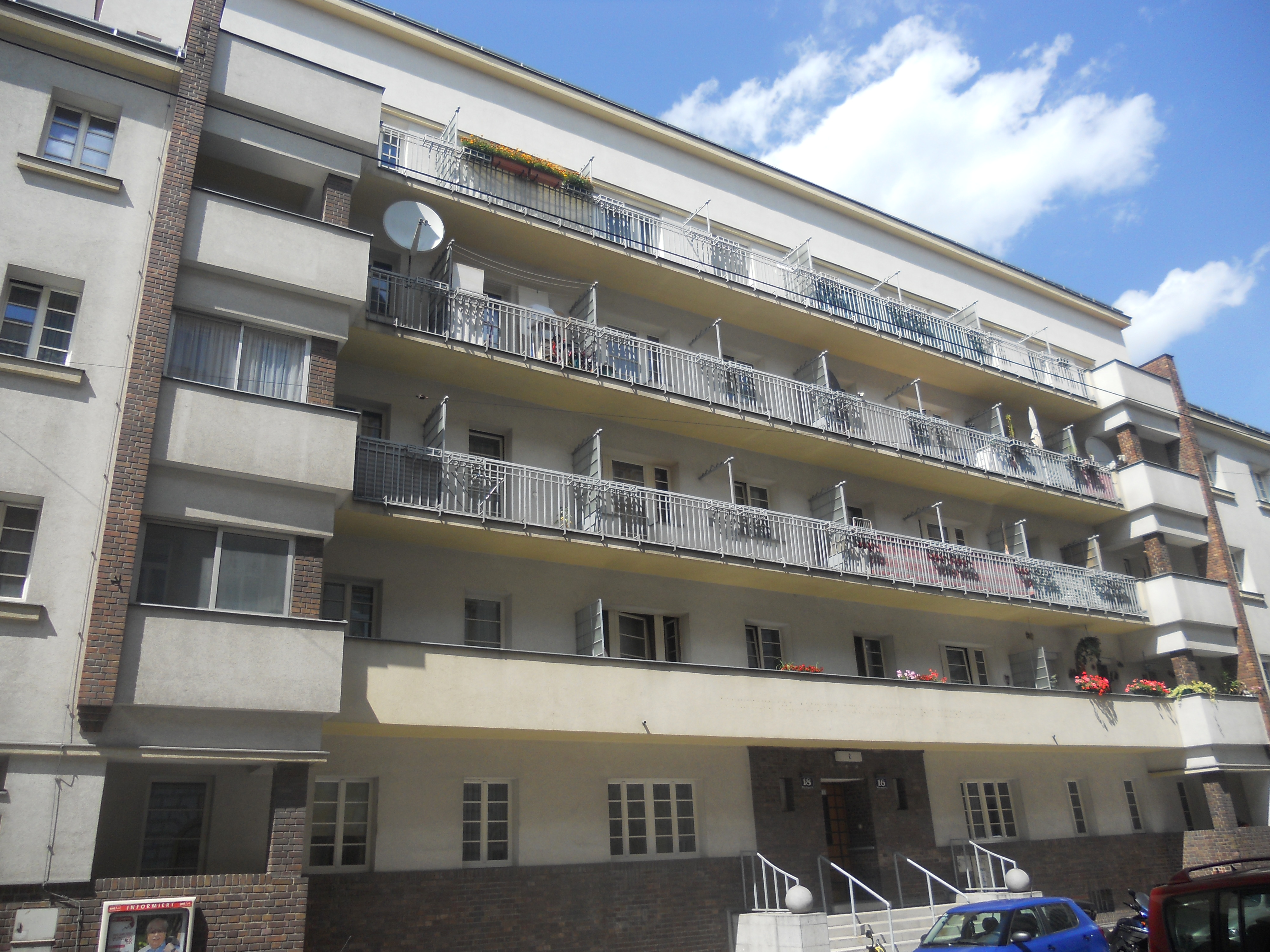 Haus Weyringergasse 16-18 in Wien